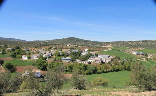 Panorámica de Villalobos